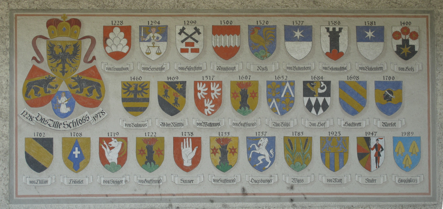 Gerzensee, Altes Schloss, Wappentafel